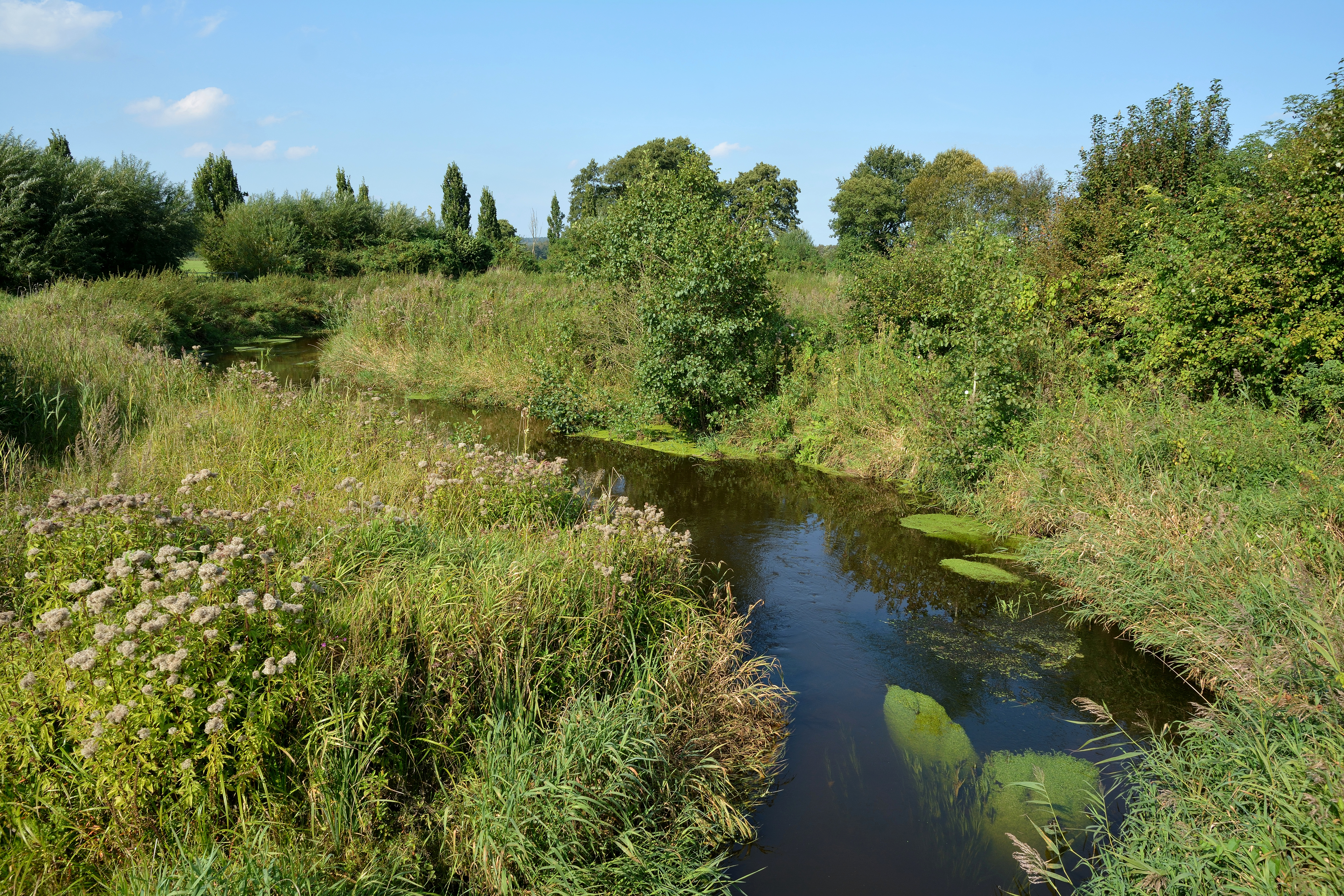 Impressionen der Buckener Au an der Landesstrasse L 123.